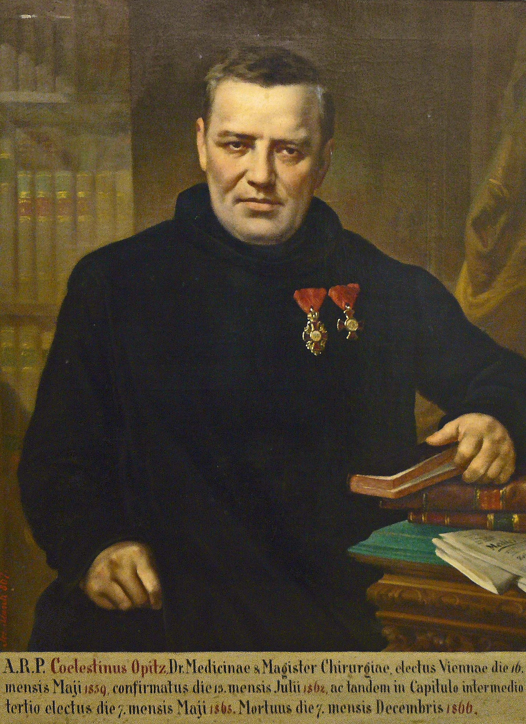 MUDr. Celestýn Opitz